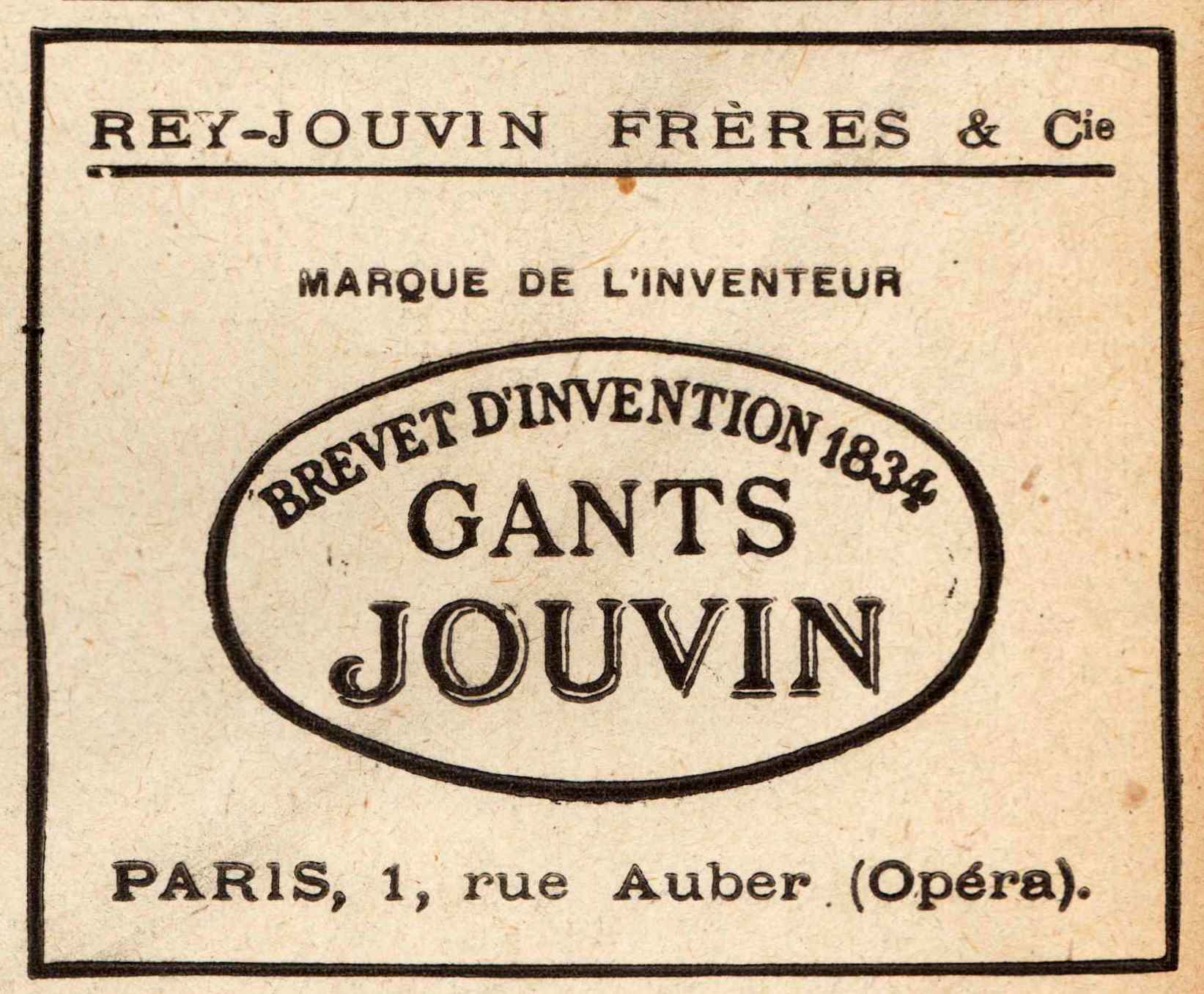 Scan of L'ILLUSTRATION 9 Ferviers 1918 Annonces page 2 Rey-Jouvin Fréres &Cie